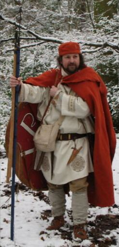 Reeanactor der einen spätrömischen Grenzsoldaten darstellt